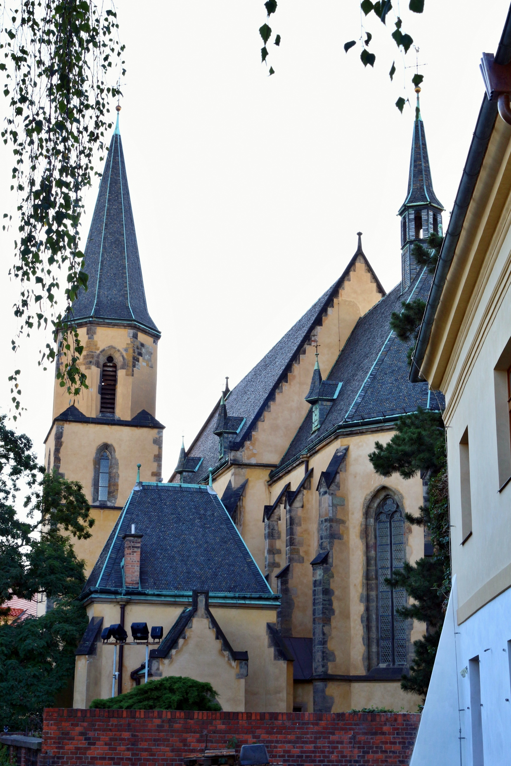 Kostel svatého Apolináře v Praze